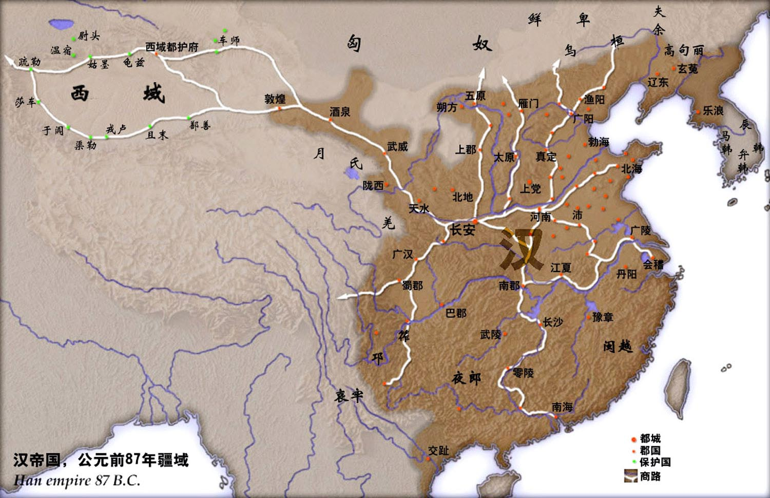 公元前87年时的西汉疆域。